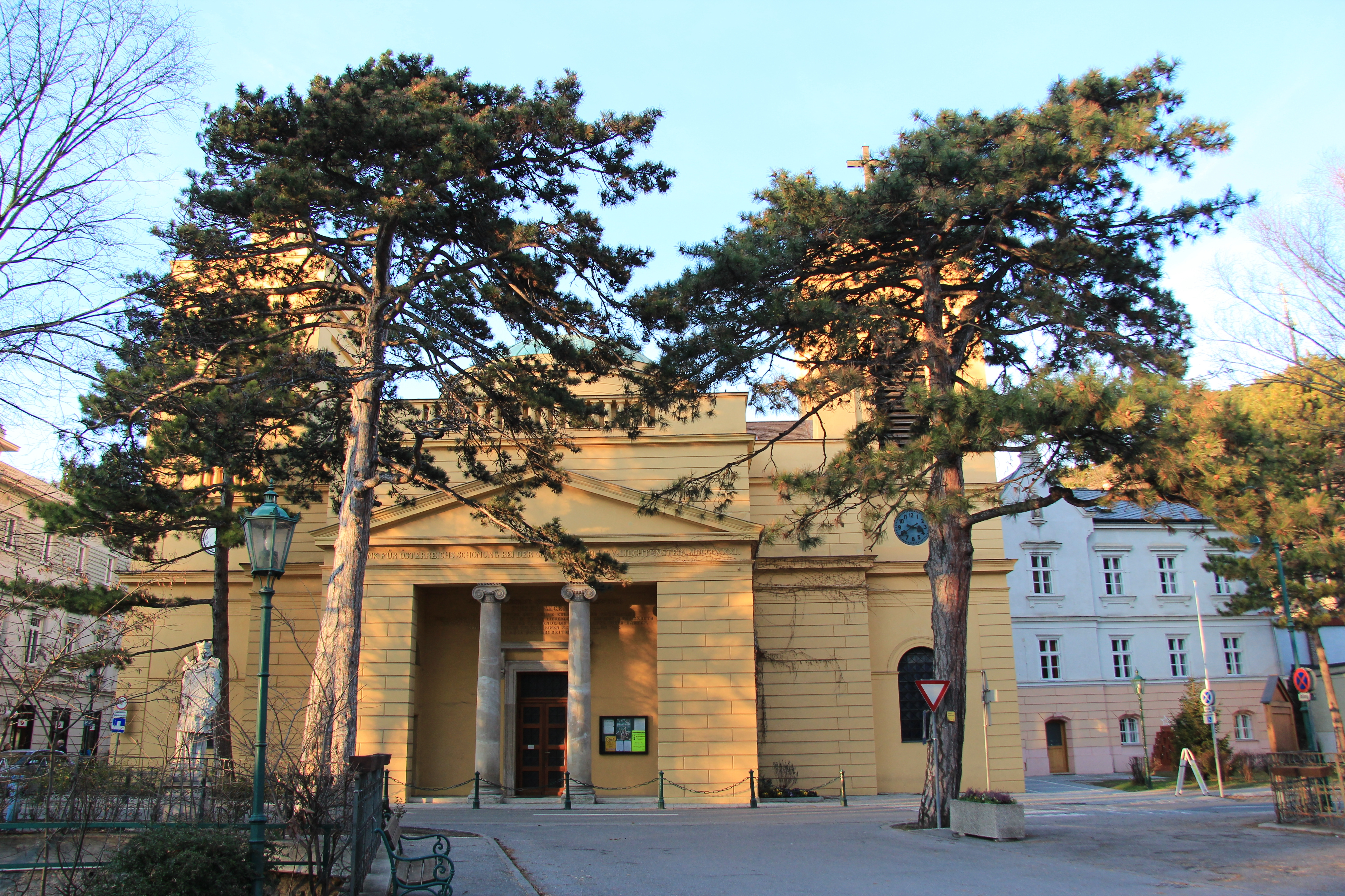 Pfarrkirche in der Hinterbrühl mit geschützten Föhren im Vordergrund This media shows the natural monument in Lower Austria with the ID MD-010.